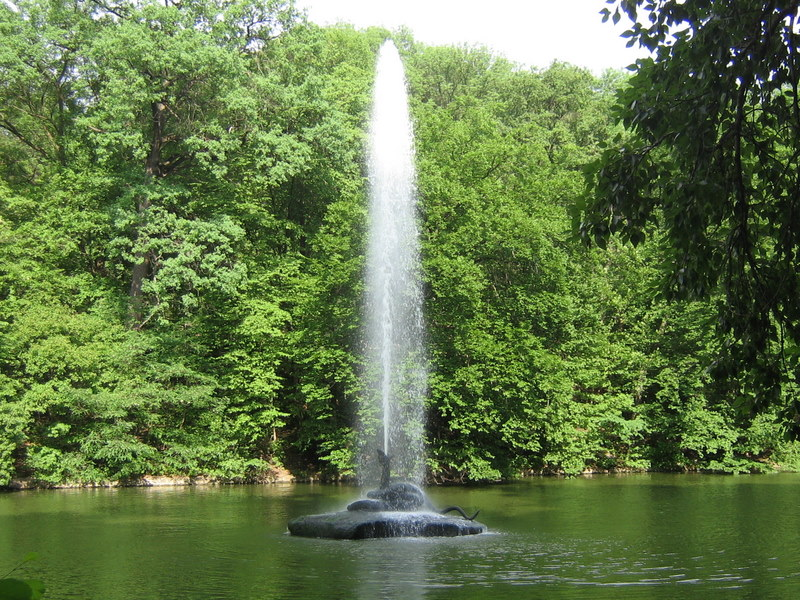 Der Brunnen „Die Schlange“.